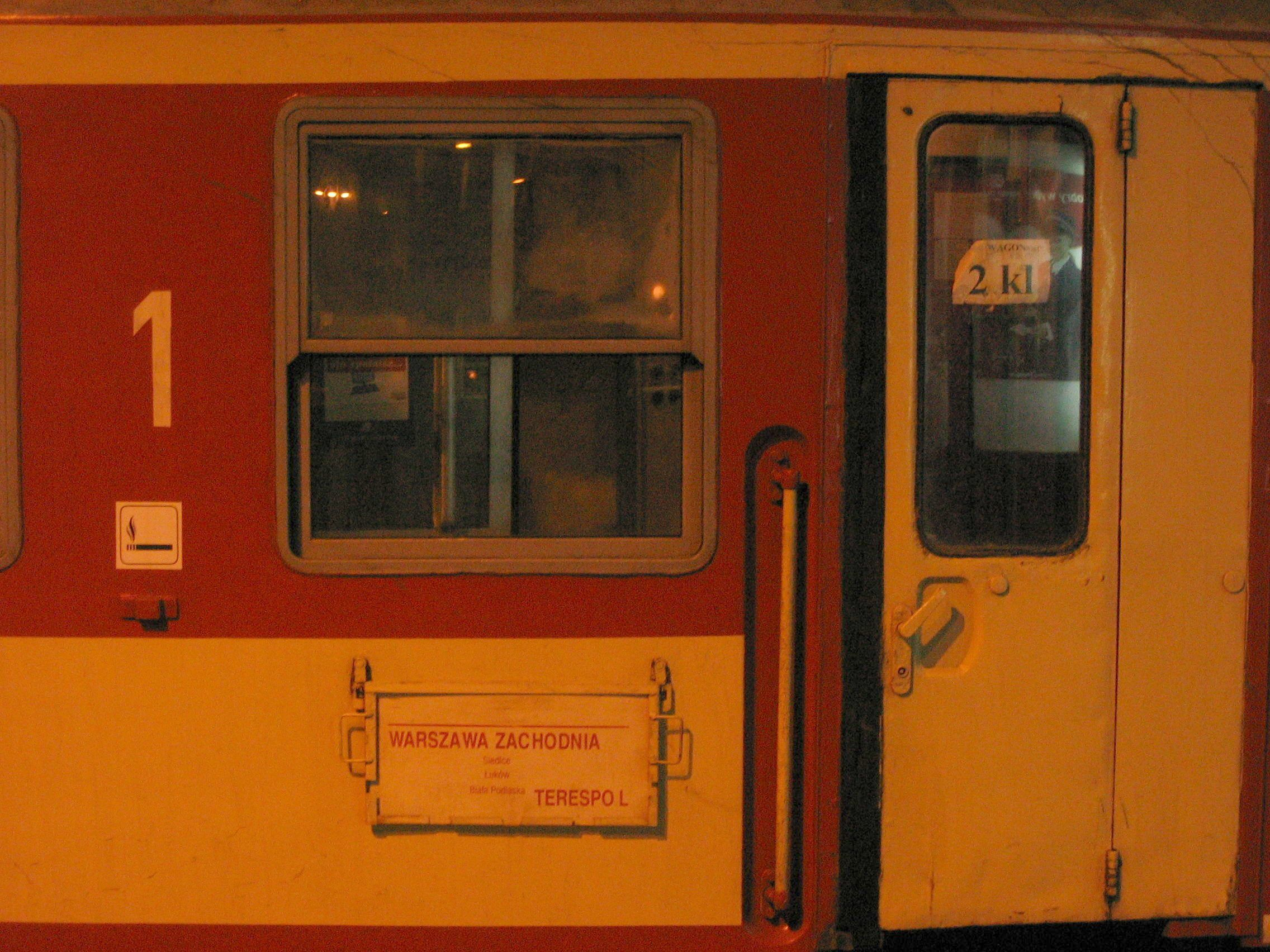 wagon klasy 1 tymczasowo zdeklasowany na klasę 2 - stacja Warszawa Wschodnia, 2008-04-03, 19:41, pociąg do Terespola/Moskwy.